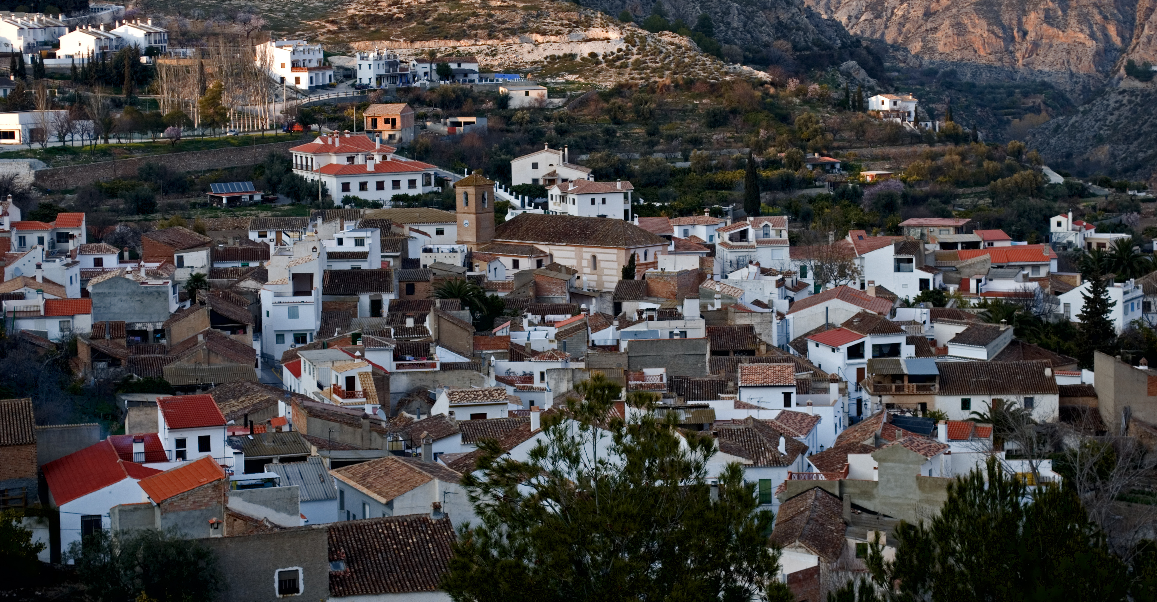 Vista general de Cónchar, provincia de Granada (España)